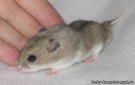 фото китайского хомячка